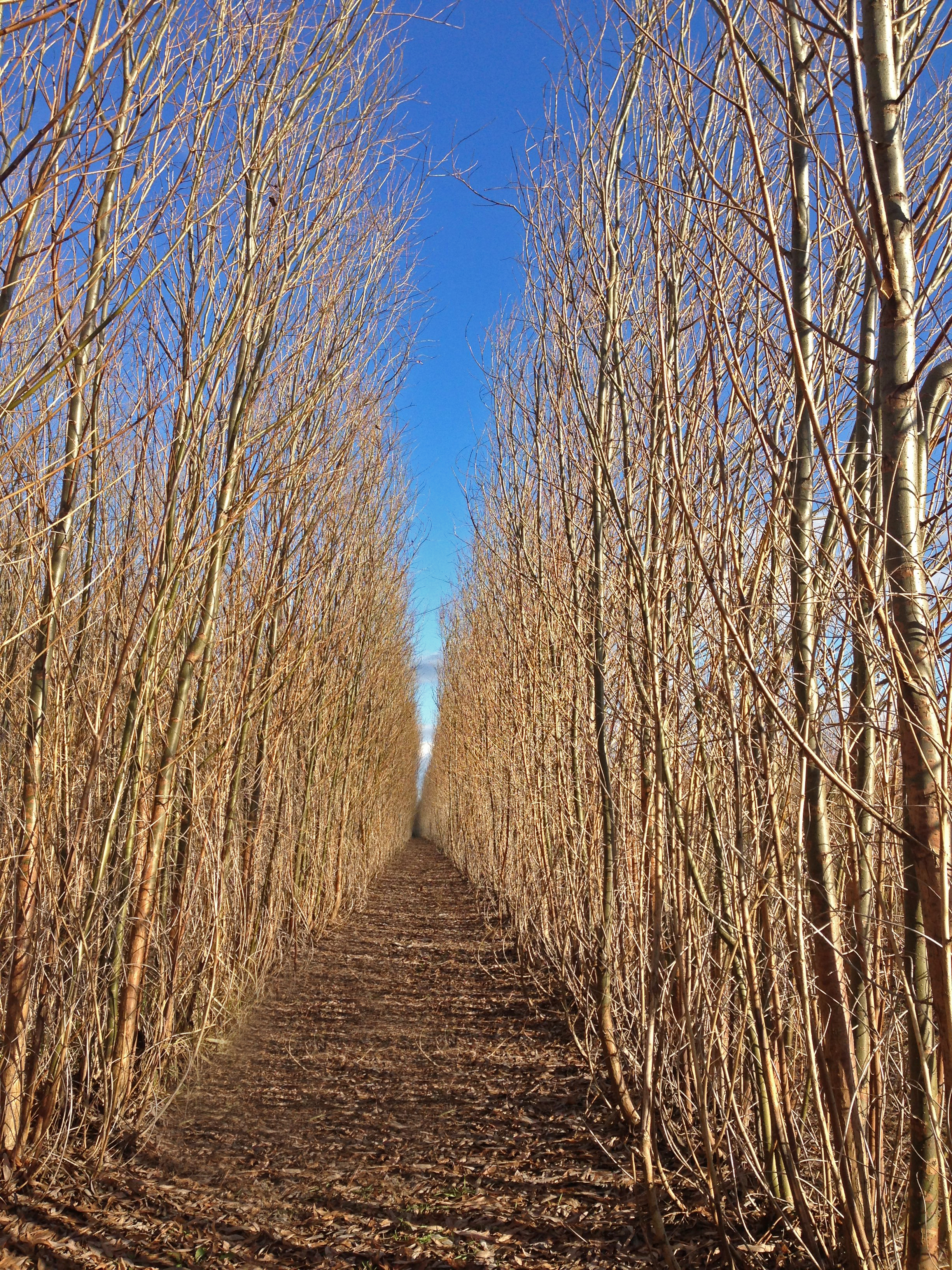 Kétéves 'Express' fűz ültetvény